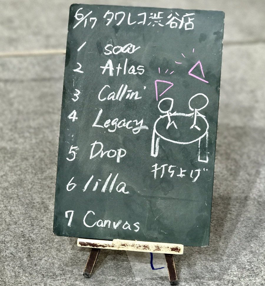 amiinAセトリボード(20170617(1))